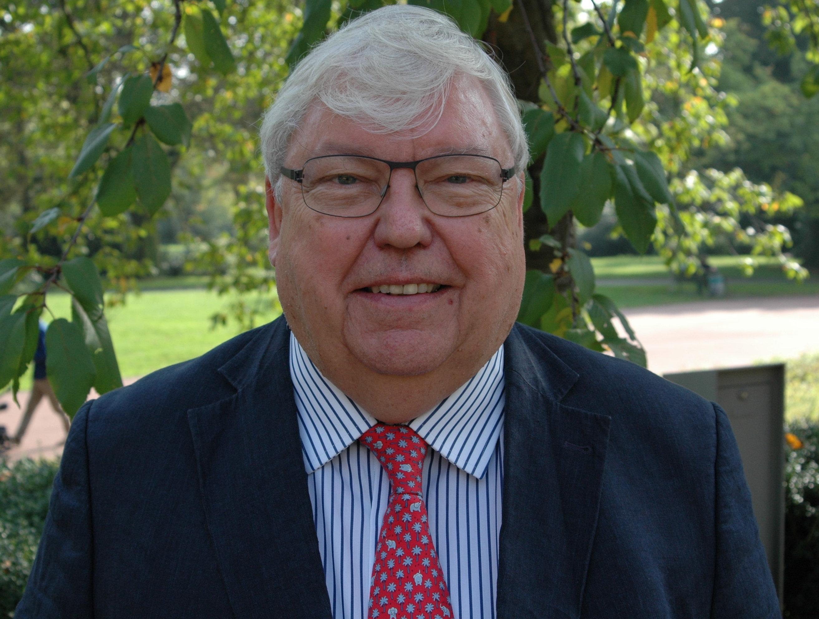 Pressekonferenz der Wirtschaftsförderung metropoleruhr (wmr) zur Präsentation der Metropole Ruhr bei der Münchener Immobilienmesse Expo Real